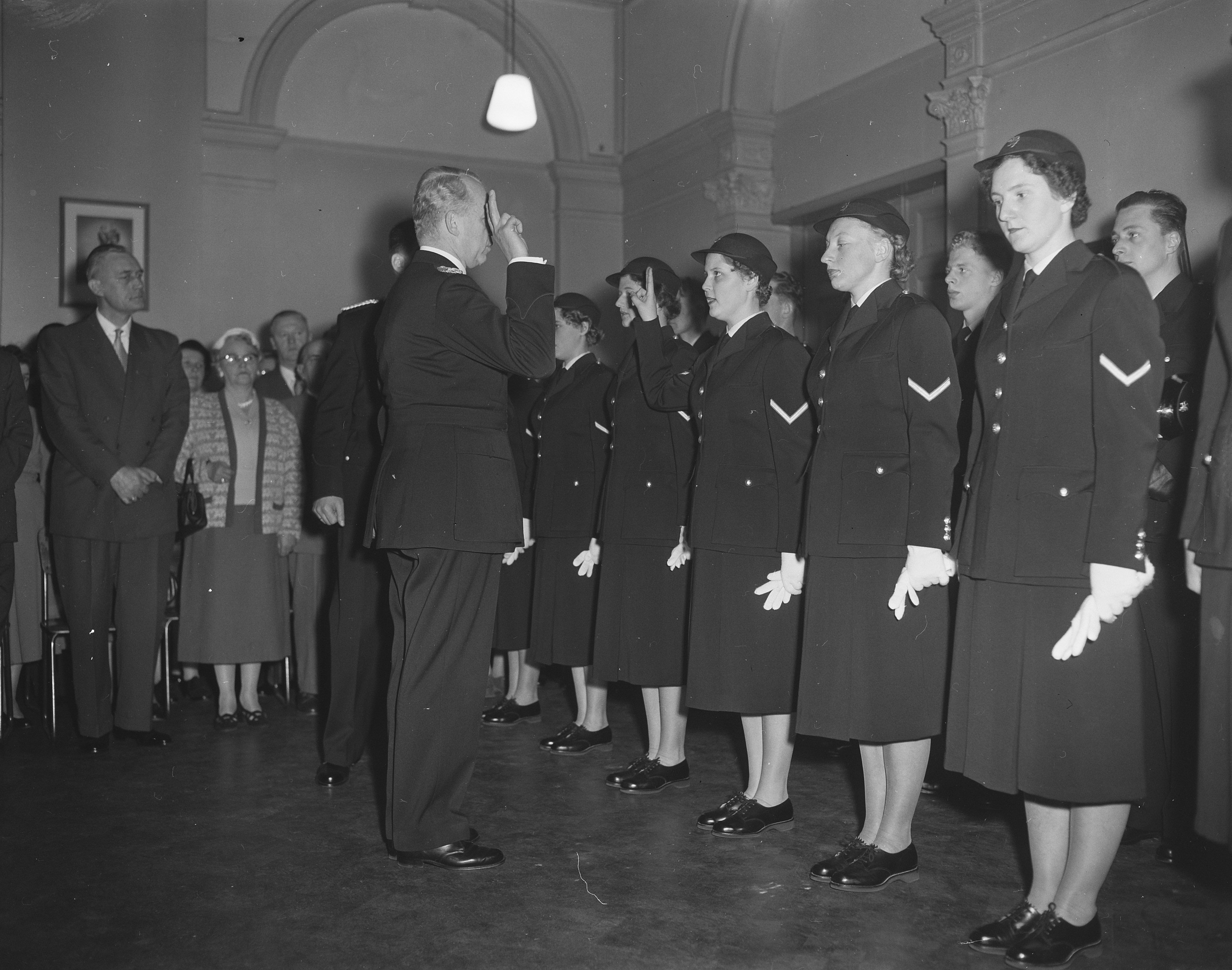 Collectie / Archief : Fotocollectie Anefo Reportage / Serie : [ onbekend ] Beschrijving : Beediging eerste vrouwelijke politie Den Haag Datum : 9 januari 1957 Locatie : Den Haag, Zuid-Holland Trefwoorden : Beedigingen, POLITIES Fotograaf : Bilsen, Joop van / Anefo Auteursrechthebbende : Nationaal Archief Materiaalsoort : Negatief (zwart/wit) Nummer archiefinventaris : bekijk toegang 2.24.01.04 Bestanddeelnummer : 908-2303